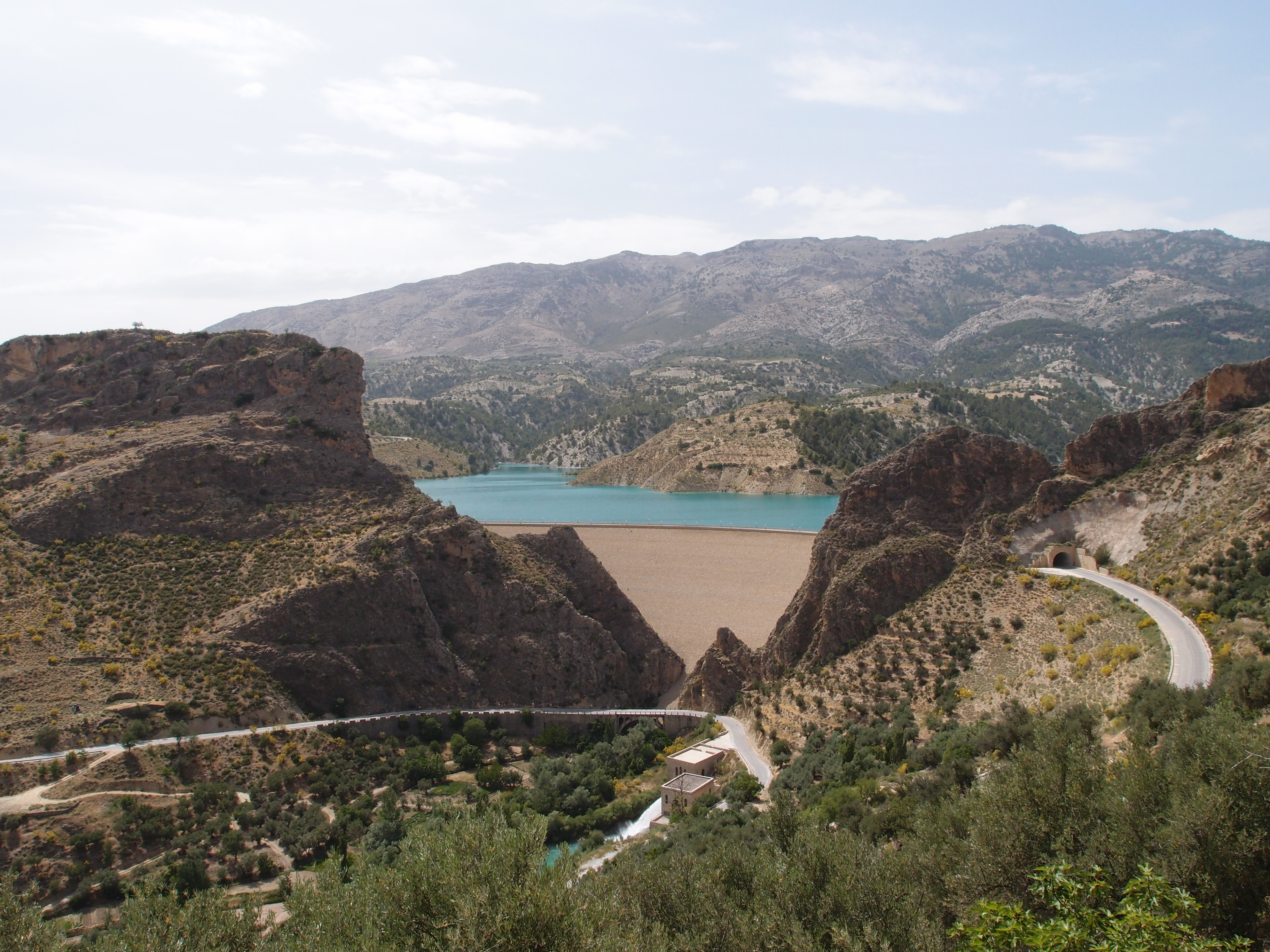 Embalse del Portillo.